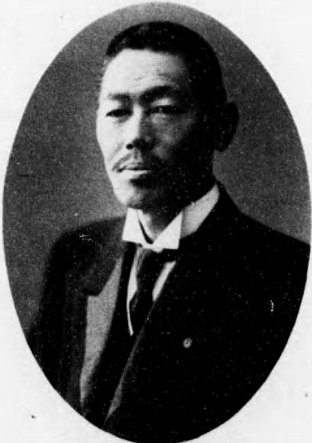 正木直彦（1862-1940）